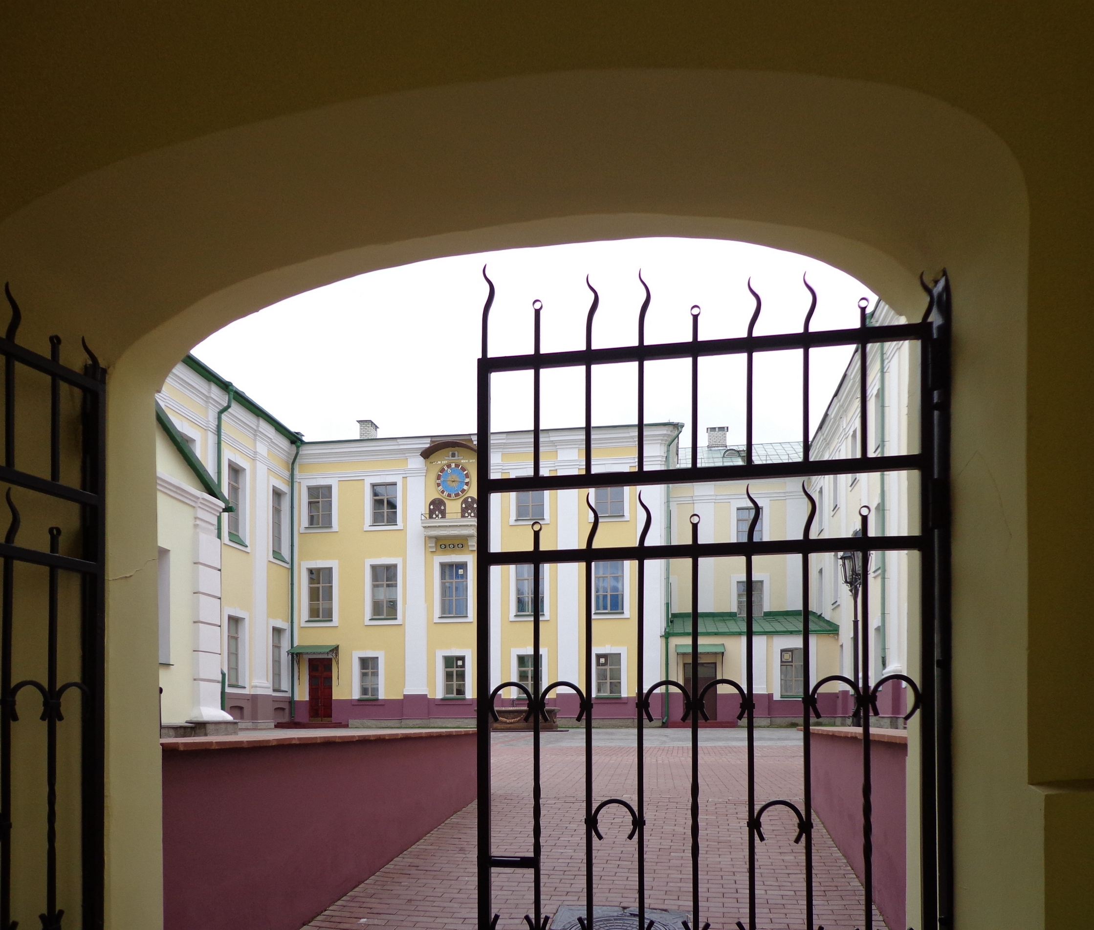 ПОЛАЦК. Унiверсiтэт. Брама да Малога дворыка / POLACK. University. Brama da Maloha dvoryka.